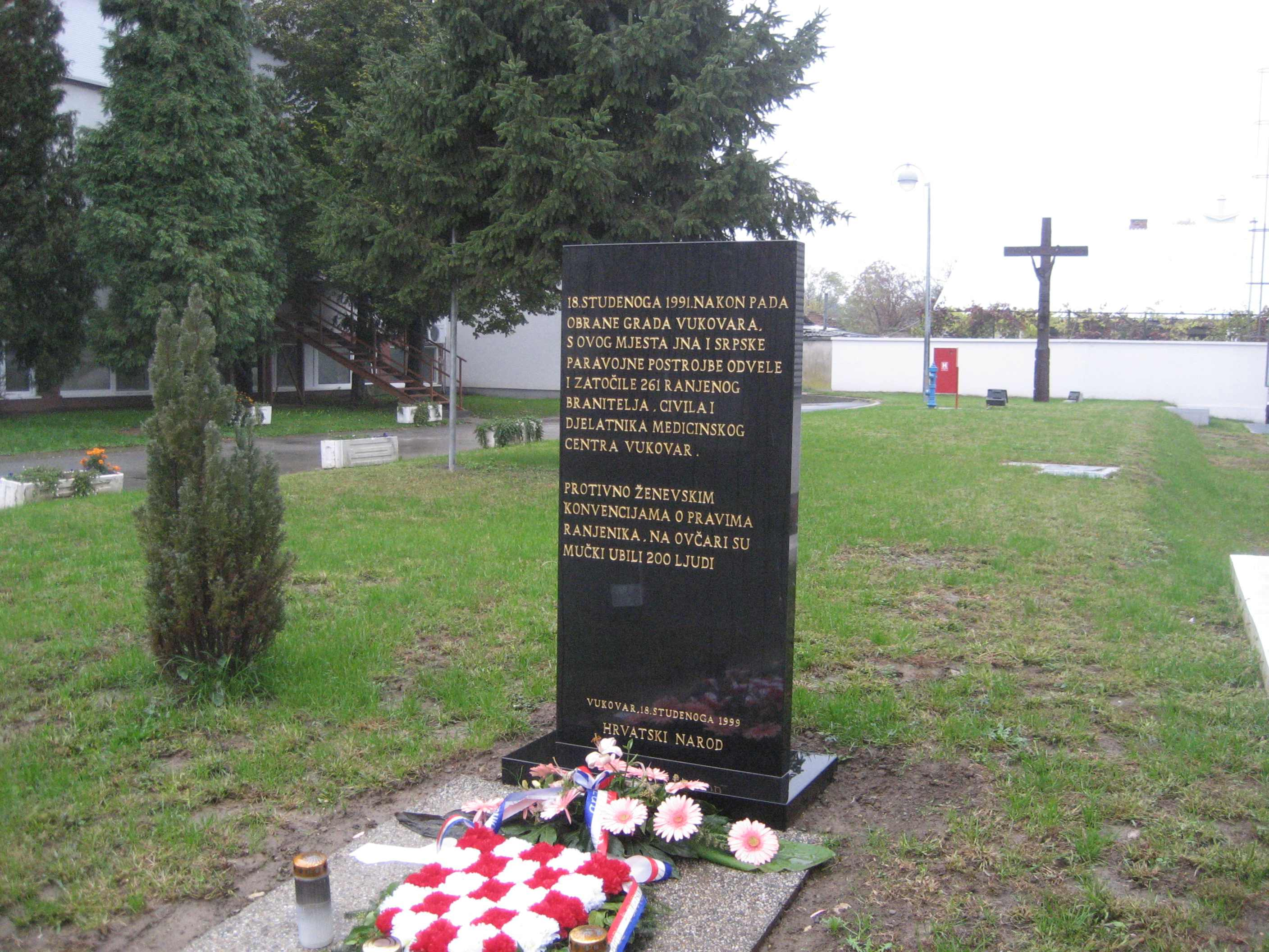 Memorial, Vukovar Hospital